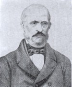 Pietro Thouar, foto di autore sconosciuto